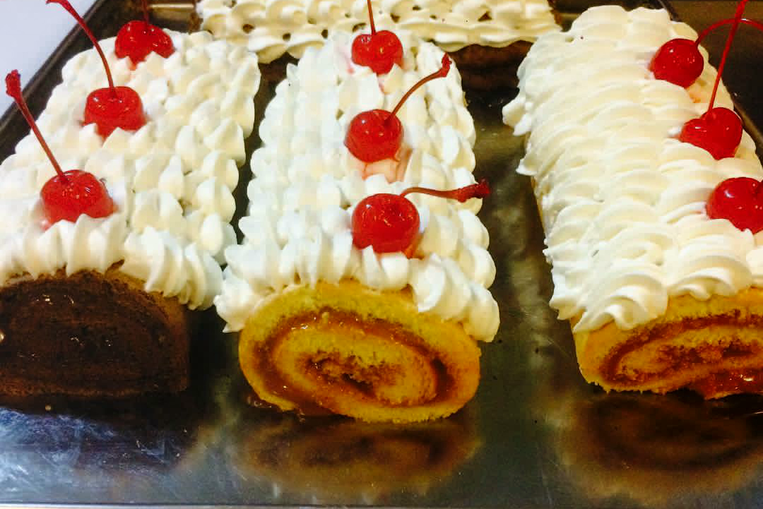 Arrollados de chocolate y dulce de leche con crema chantilly servidos en San José